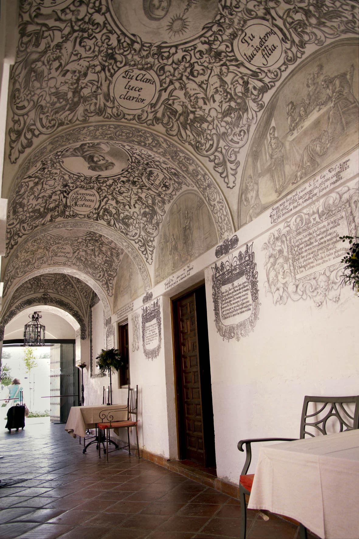 antiguas pinturas del siglo XVI restauradas ubicadas en el interior del Hotel Convento La Magdalena